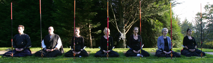 Zazen Kata-Sarbacana